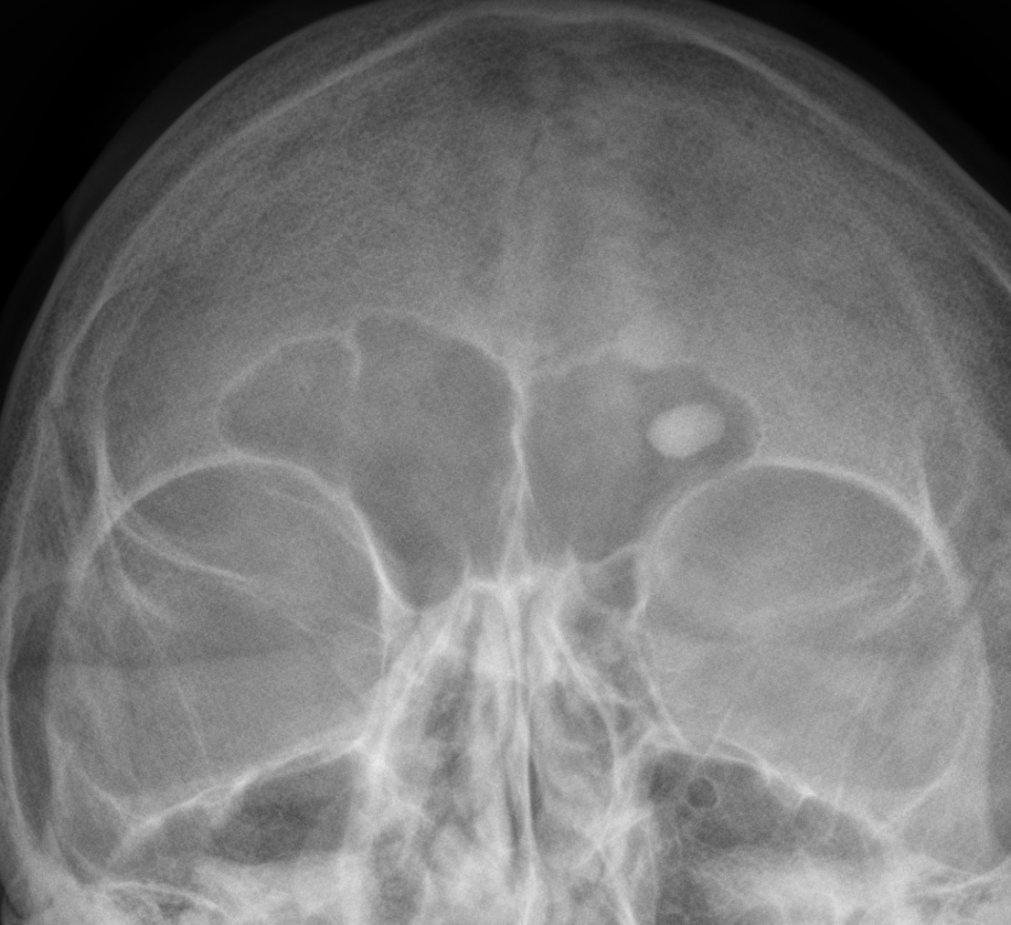 Typisches Osteom der Stirnhöhle im Röntgenbild a.p.